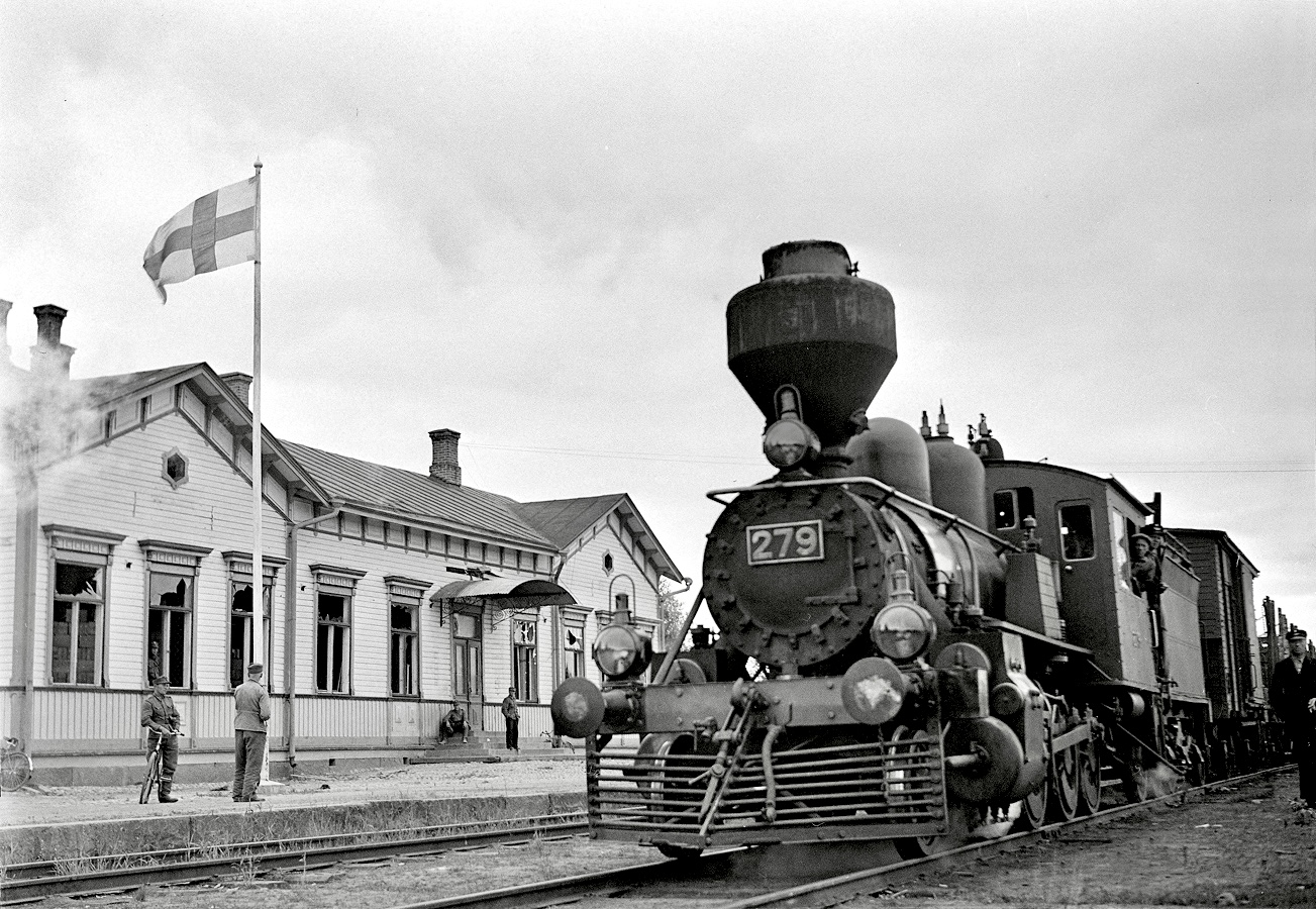 Вяртсиля